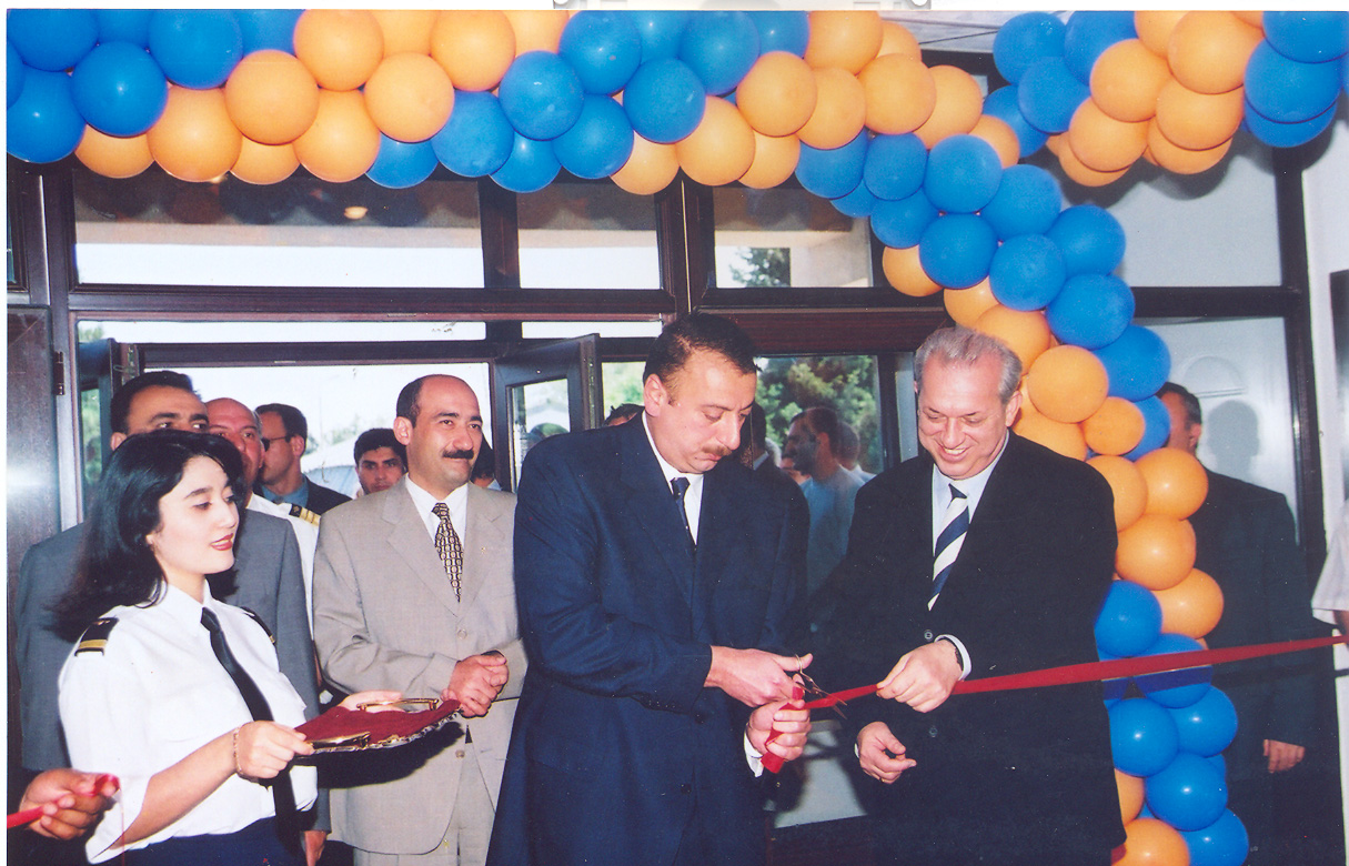 Milli Olimpiya Komitəsinin Sədri İlham Əliyev MAA-nın İdman Kompleksinin açılış zamanı; 2000-ci il.